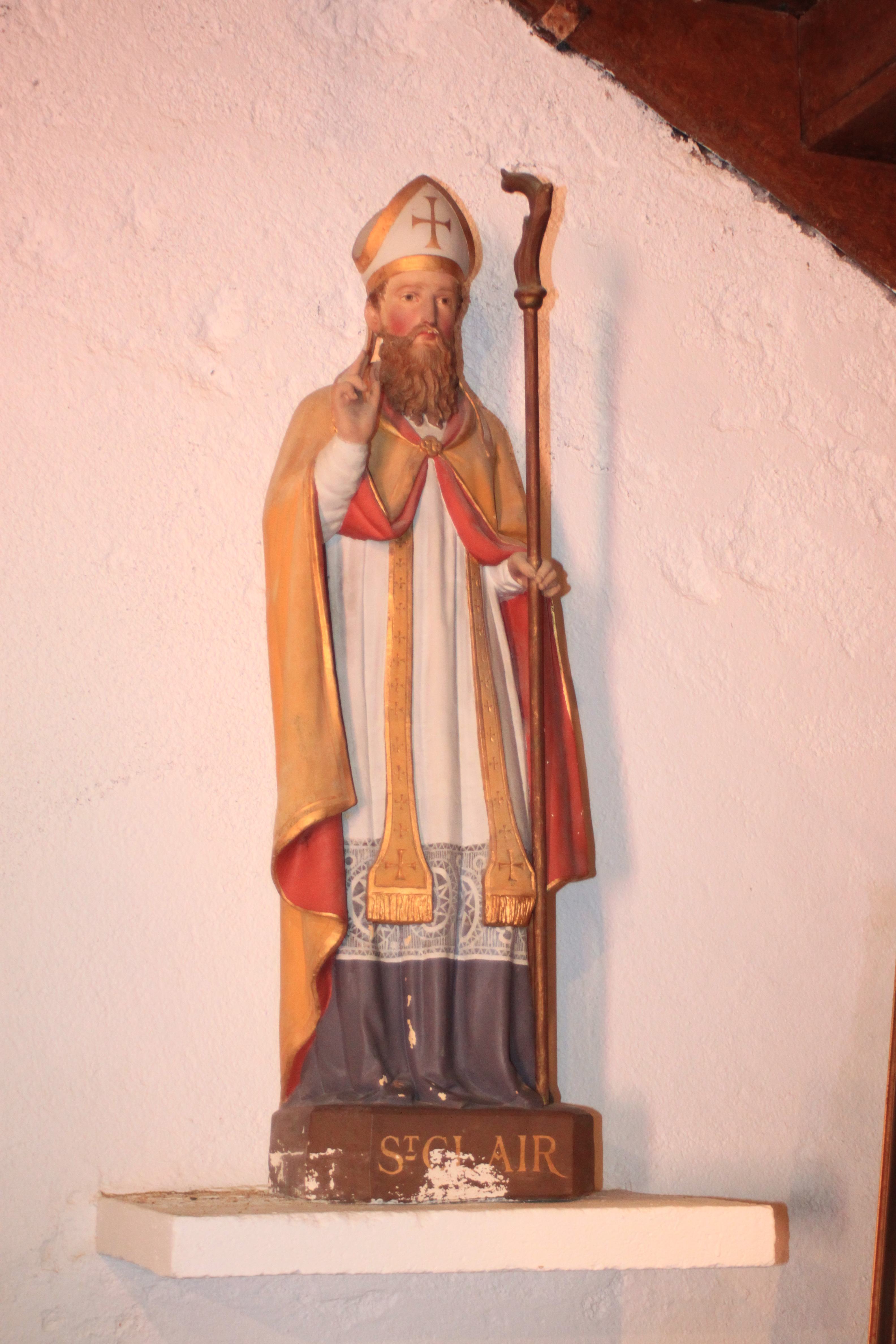 Saint-Clair, chapelle Saint-Marc (XV°1790), Kervalet, Fr-44-Batz-sur-Mer.